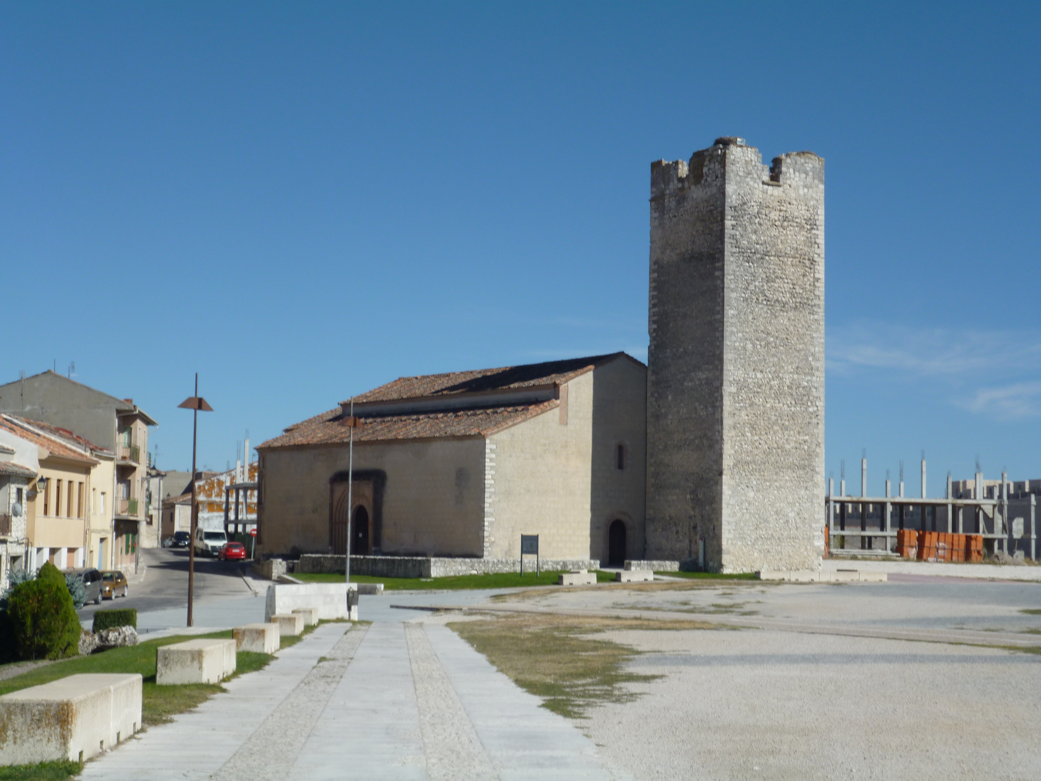 Plaza del castillo.